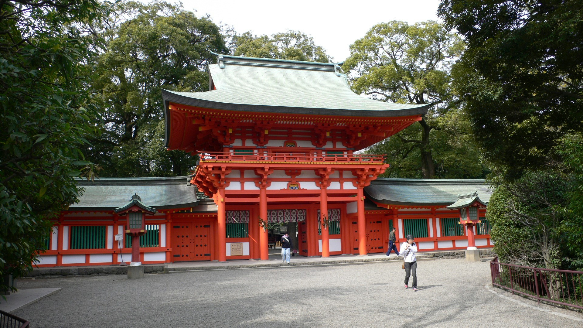 Hikawa-jinja （Gate：楼門）